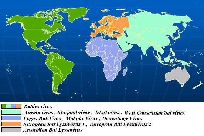 географско разпространение на вирусите на беса